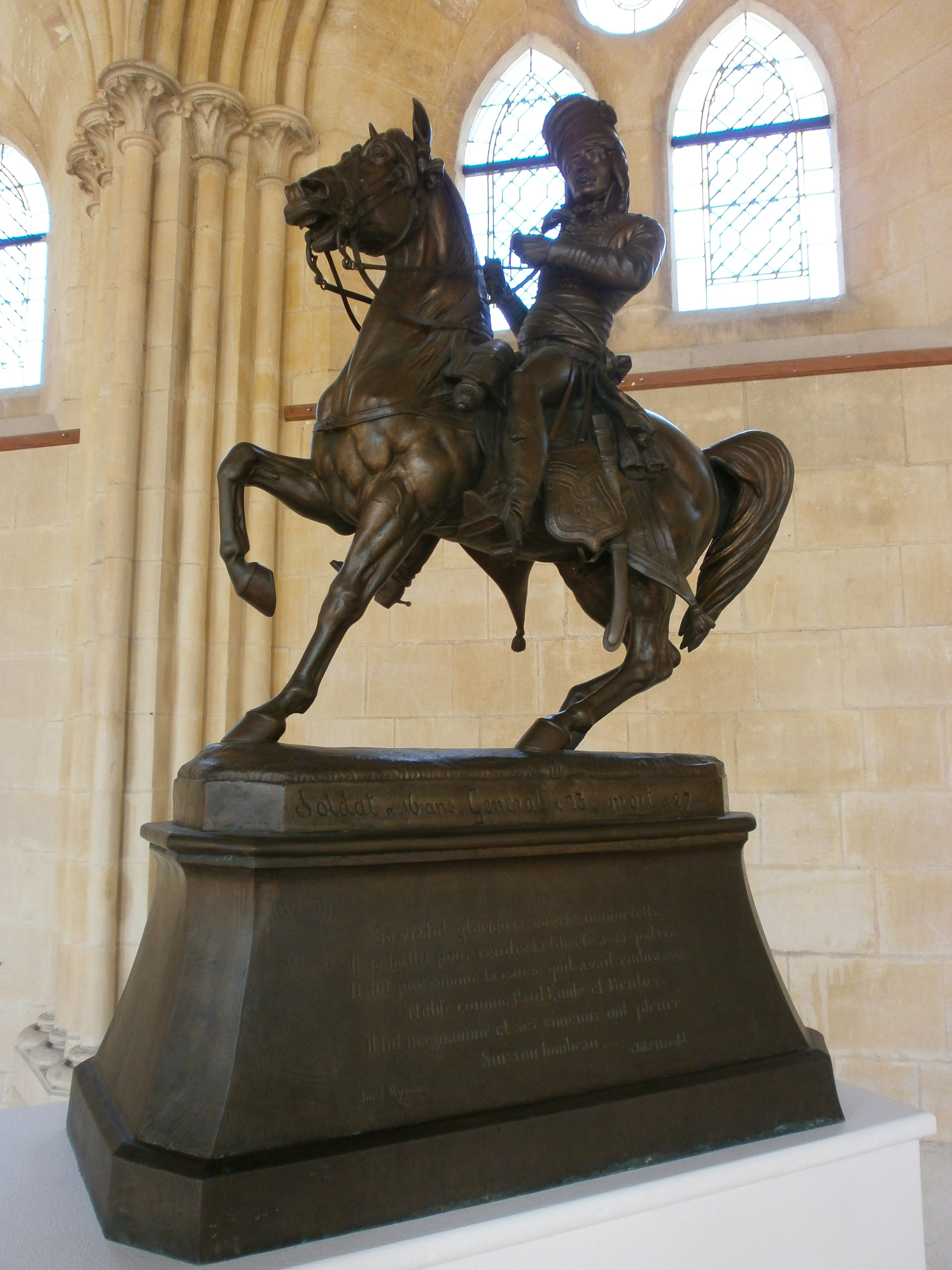 Musée Thomas-Henry de Cherbourg-Octeville - Armand Le Véel (1821–1905) Alternative namesArmand Le VeelDescriptionFrench sculptorDate of birth/death26 July 182126 July 1905Location of birth/deathBricquebecCherbourgWork locationCherbourg, ParisAuthority control : Q2861901 VIAF: 78733182 LCCN: nr2005004341 SUDOC: 181680904 WorldCat : François Marceau, dit le Général Marceau (1860). Bronze patiné brun, portant les vers extraits du Chevalier Harold de Lord Byron : Sa vie fut glorieuse, courte, immortelle. Il se Battit pour rendre la liberté à sa patrie. Il fut pur comme la cause qu'il avait embrassée. Noble comme Paul-Emile et Brutus. Il fut magnanime et ses ennemis ont pleuré Sur son tombeau.